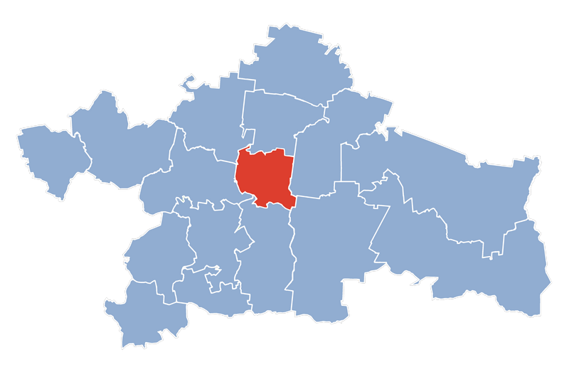 Miasto Białystok, powiat białostocki, województwo podlaskie (na podstawie danych z